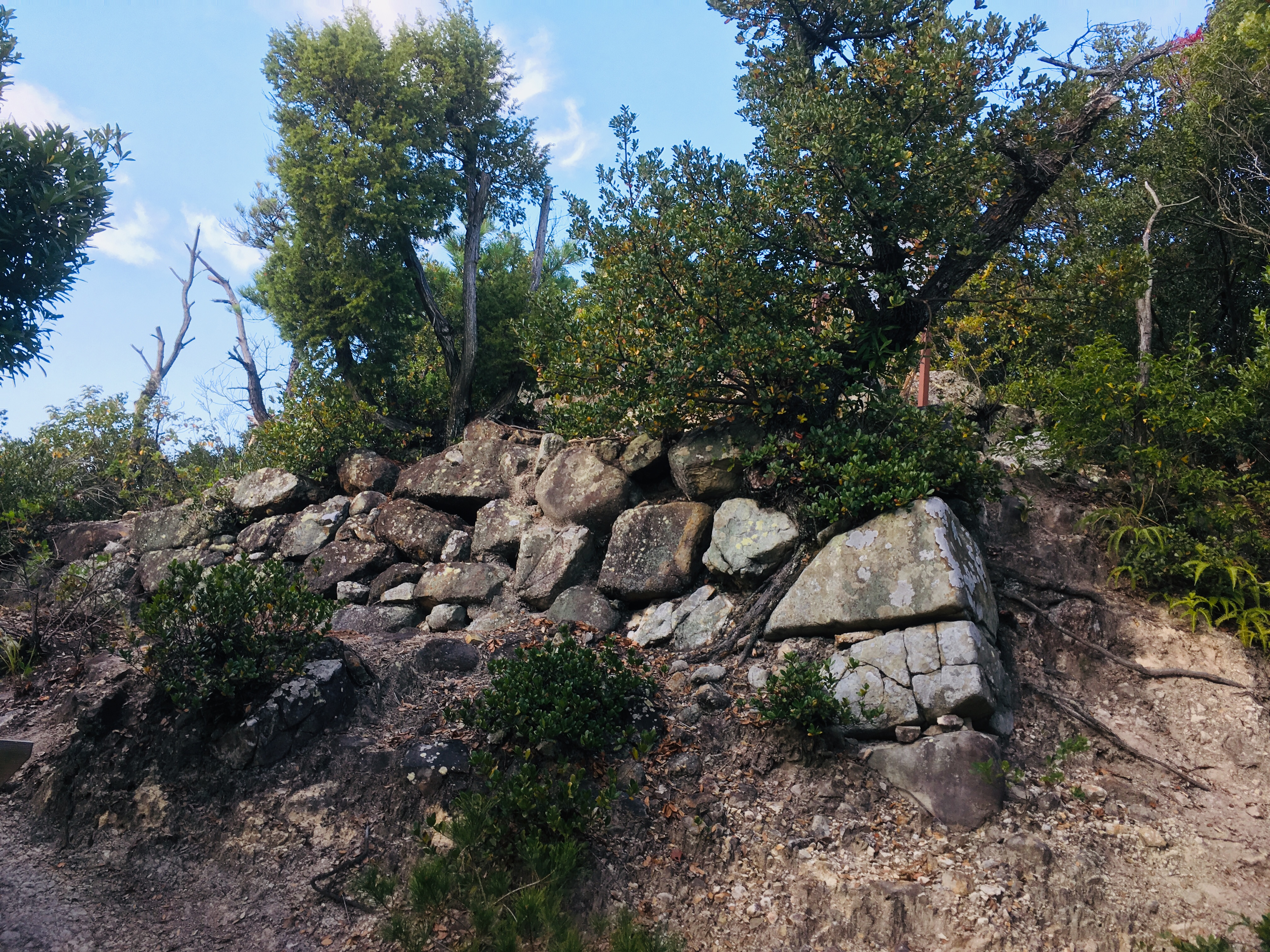 引田城に残る石垣